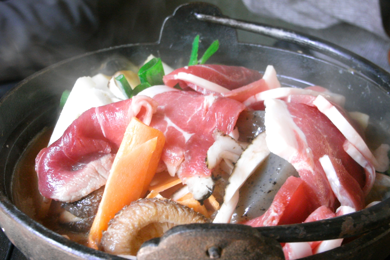 猪鍋は野菜もたっぷり。